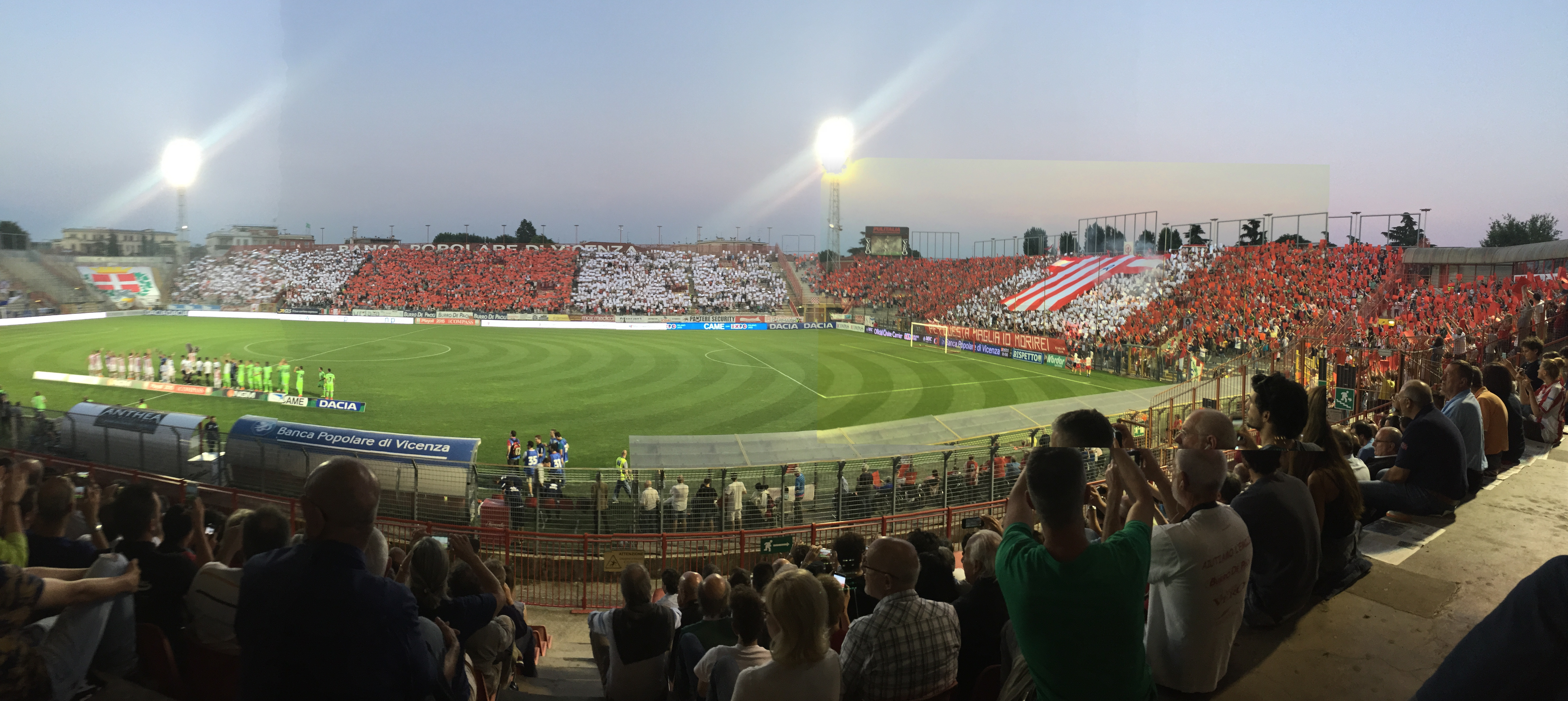 Coreografia dello Stadio Menti in occasione della semifinale di ritorno di play-off Serie B 2014-15